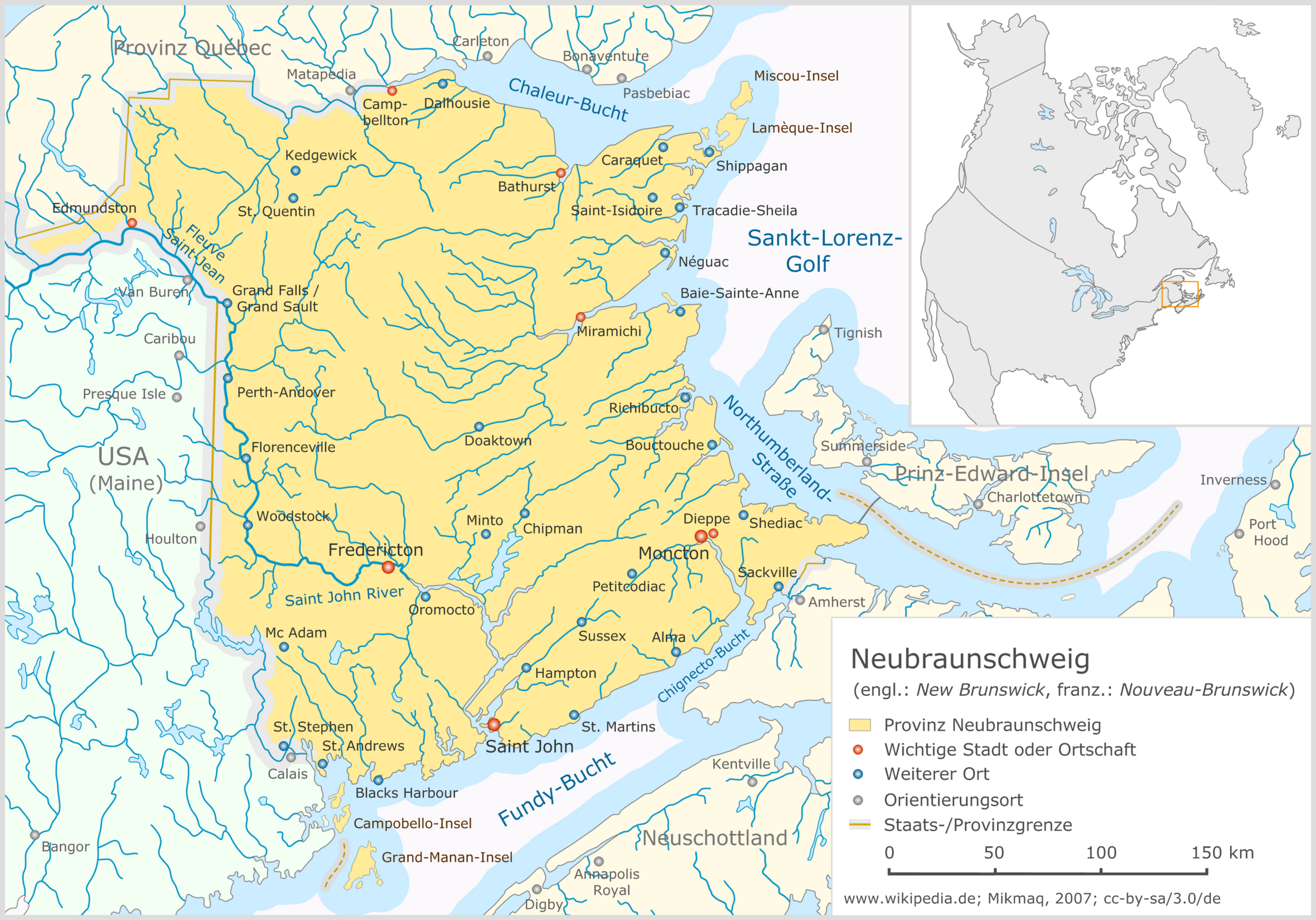 Neubraunschweig